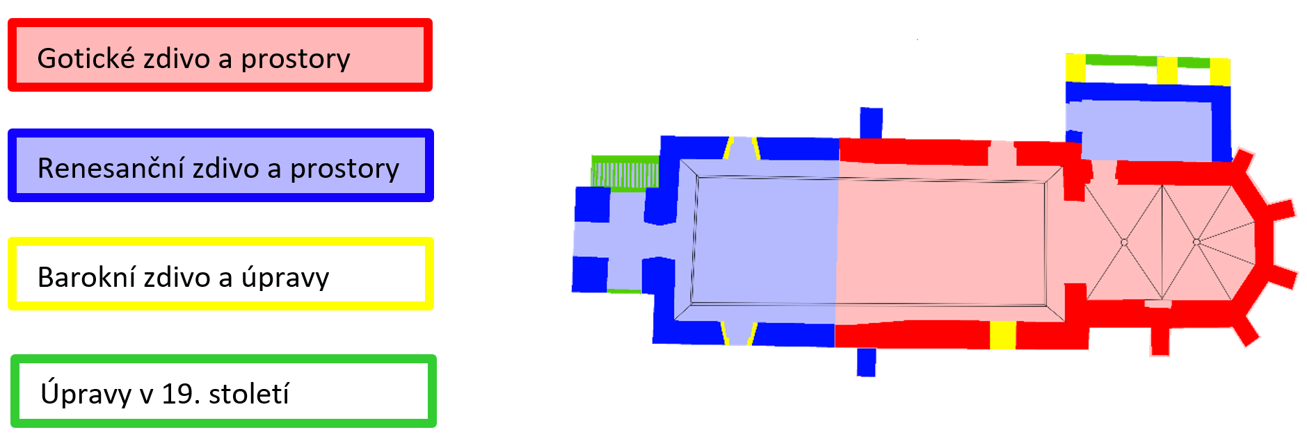 A mass plan of church of st. Nicolas describing historical evolution.